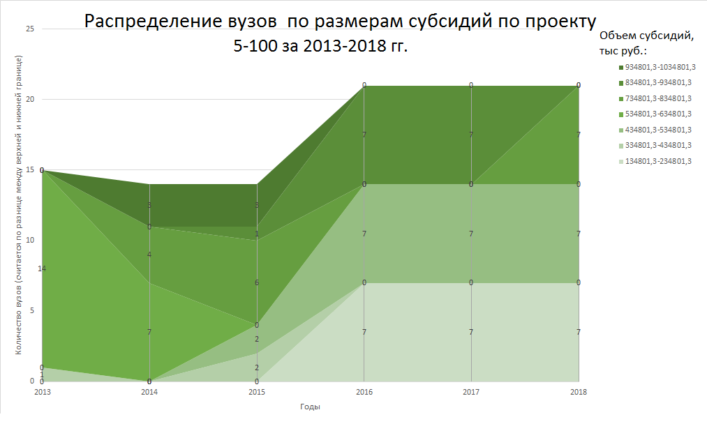 Распределение вузов по размерам субсидий по проекту 5-100 за 2013-2018 гг.